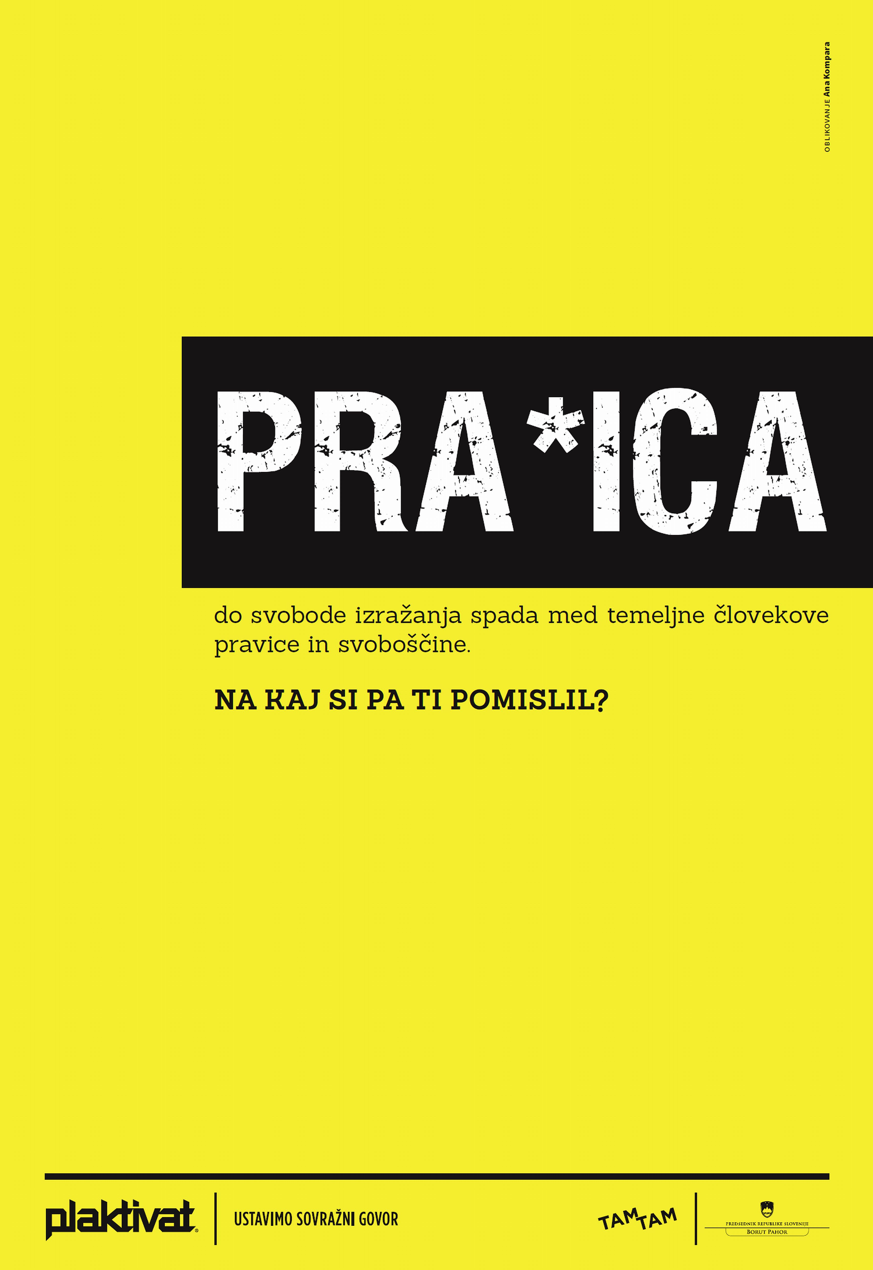 Ana Kompara: Sovražni govor